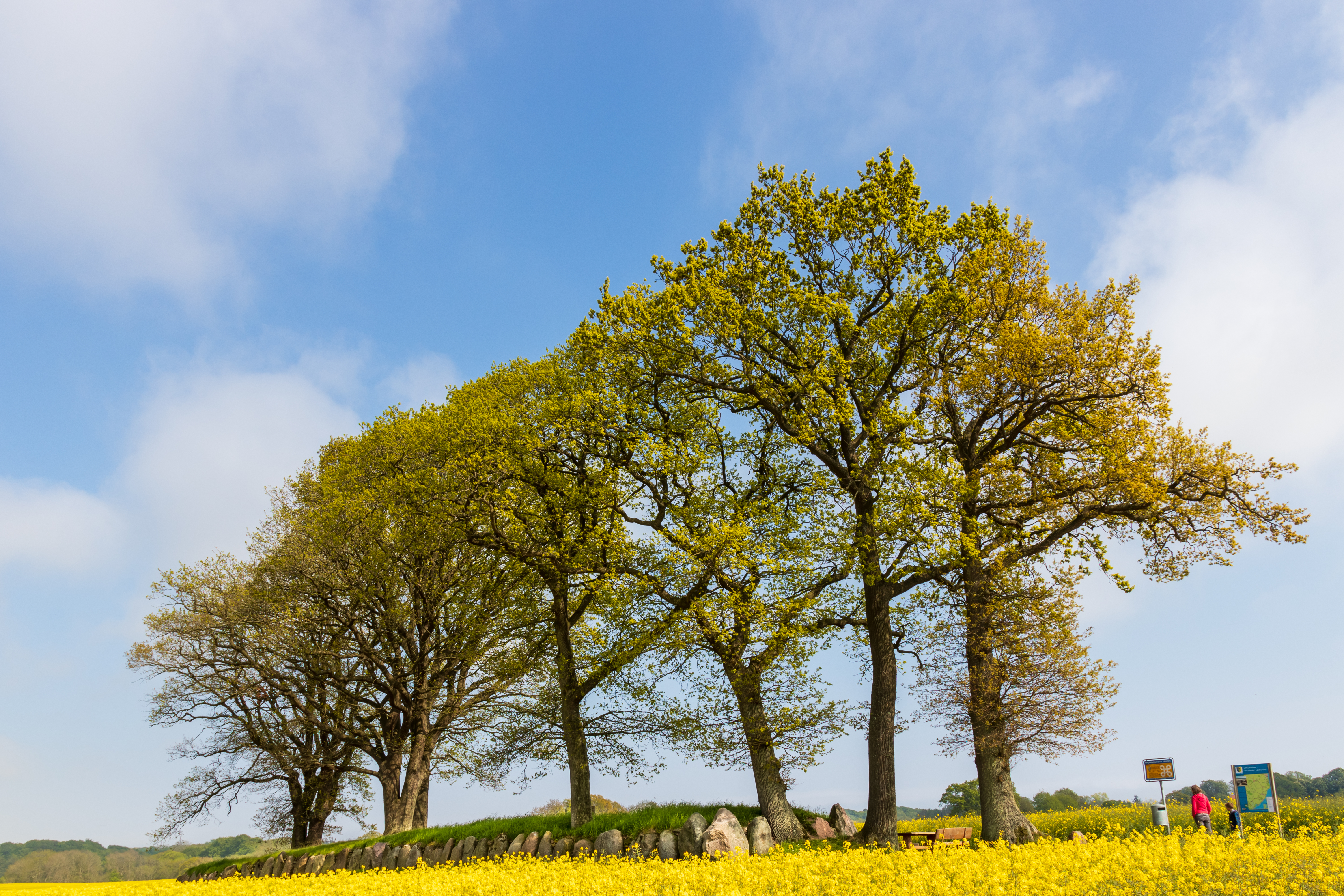 Das Großsteingrab (Langbett) Karlsminde